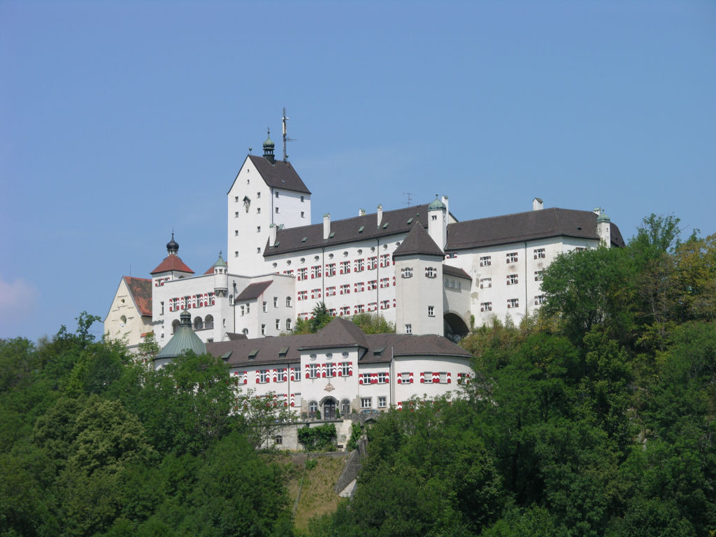 Schloss Hohenaschau bei Aschau im Chiemgau (Deutschland, Bayern)